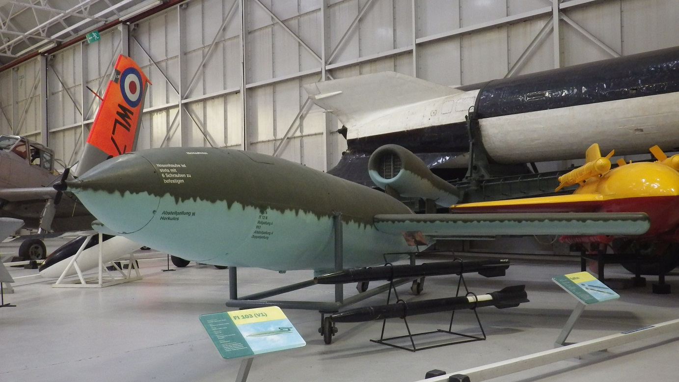 Fieseler Fi 103 V-1 RAF Museum Cosford 2015年2月28日撮影